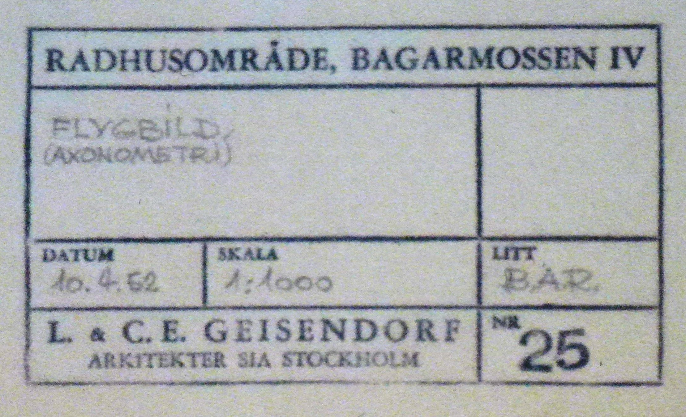 L. & C. E. Geisendorf ritningsstämpel, Riksrådsvägen